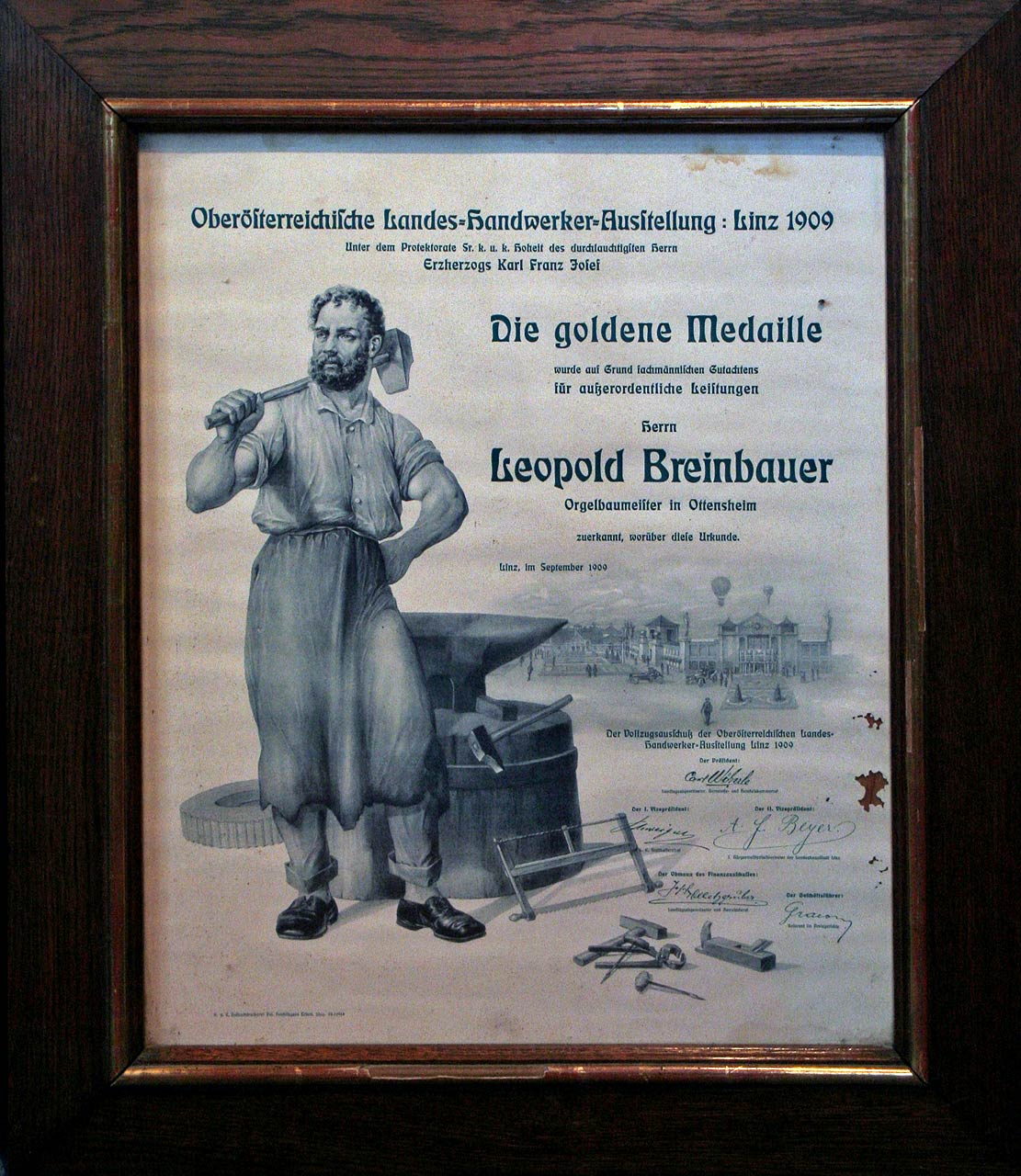 Urkunde zum Erhalt der Goldmedaille bei der oö. Landes-Handwerker-Ausstellung 1909 in Linz